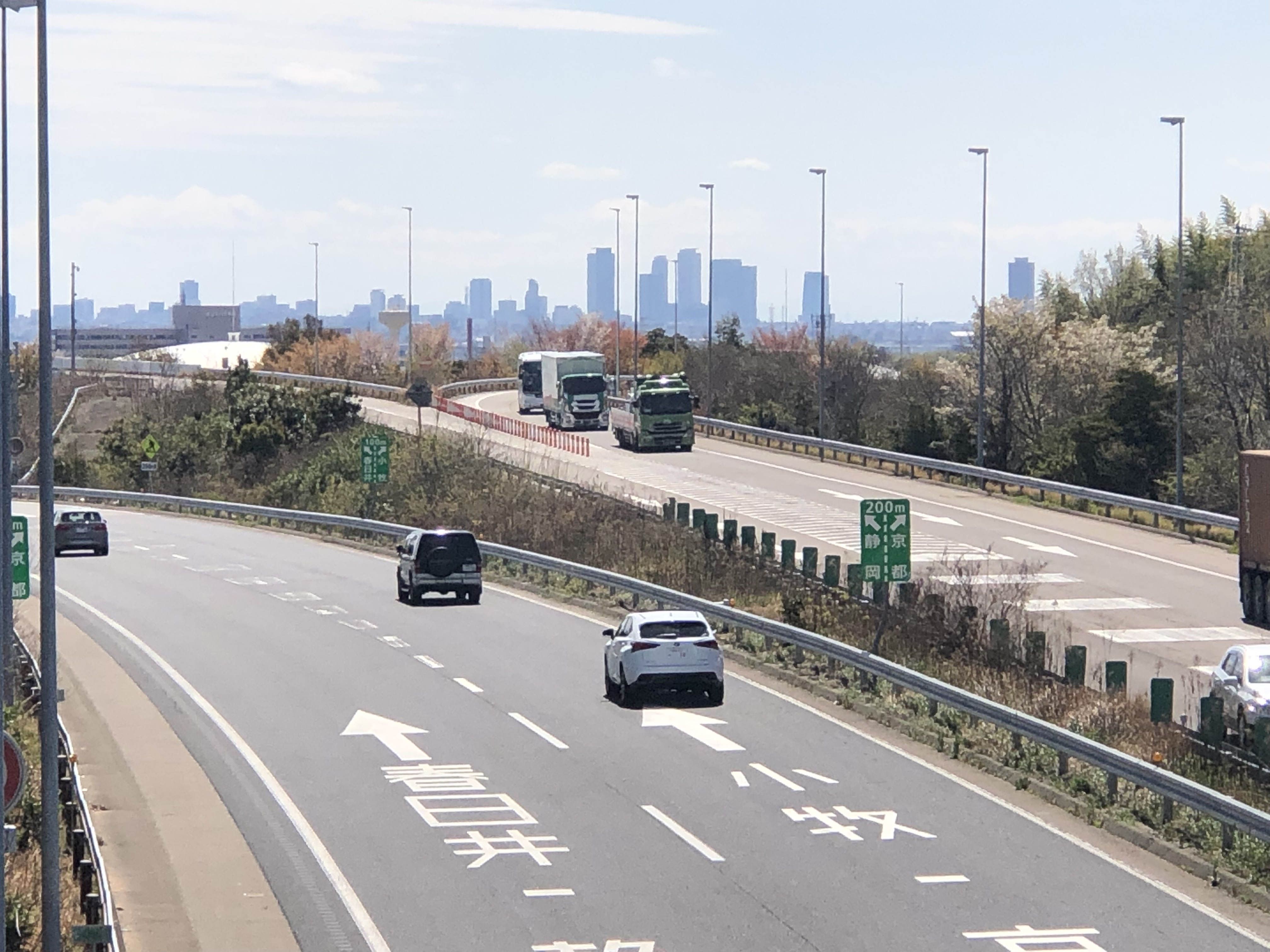 小牧市城山4丁目の跨道橋より見た小牧ジャンクション。遠くに名駅の高層ビル群を望む。南南西の方向を見る。